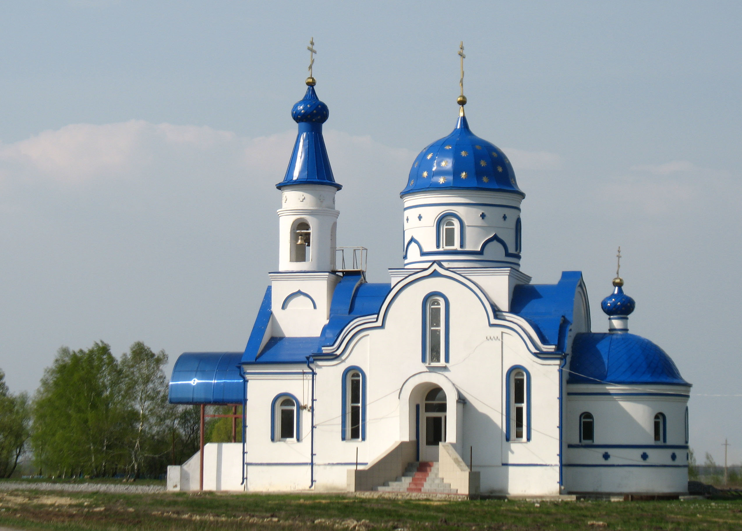 Церковь в селе Большая Поляна Тербунского района Липецкой области, 1 мая 2009 года